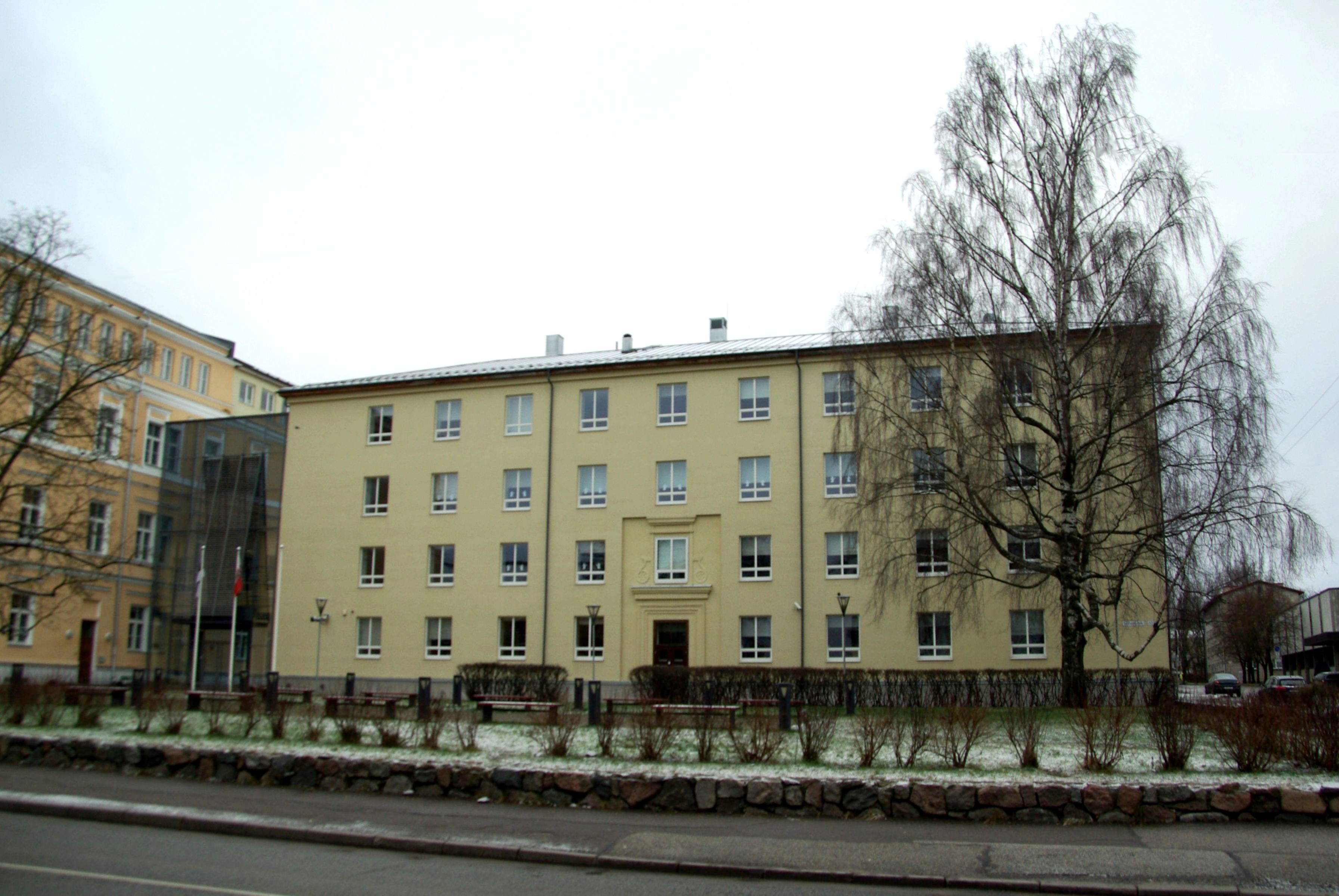 Tartu Herbert Masingu Kool on üldhariduskool Tartus